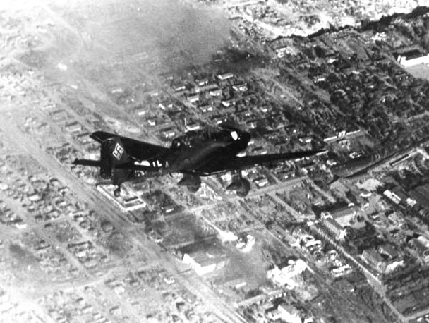 Russland, Kampf um Stalingrad, Luftangriff An der Sowjetfront: Stuka über Stalingrad.- Die Maschine des Kommandeurs, der seine Gruppe führt. PK-Aufnahme: Kriegsberichter Opitz (Sch) 5703-42 "Fr.Fr.OKW" Oktober 1942 [Herausgabedatum] [Sowjetunion.- Schlacht um Stalingrad.- Luftangriff mit Flugzeug Junkers Ju 87 "Stuka"]